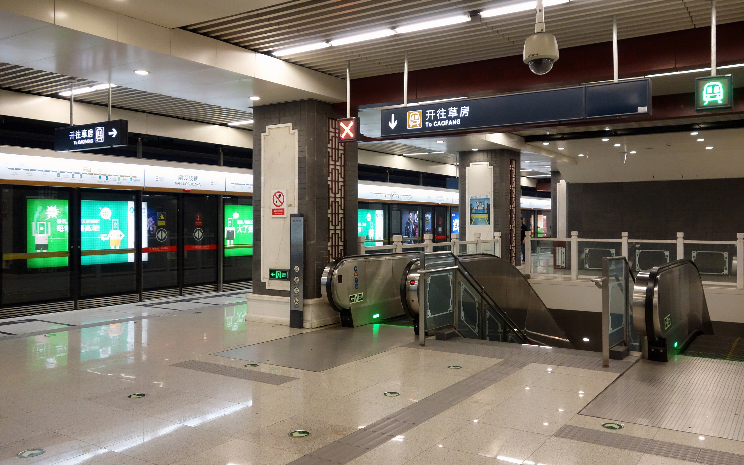 南锣鼓巷站6号线上层往海淀五路居站方向站台以及通往下层站台的扶梯